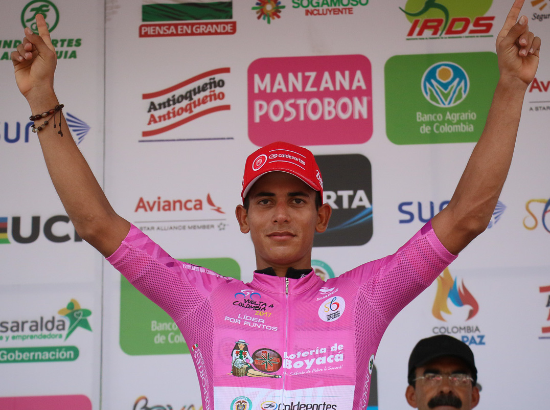 Nelson Soto en el podio. Eta.3 Vuelta a Colombia 2017 Jueves 3 de agosto de 2017. Puerto Boyacá - Barrancabermeja.